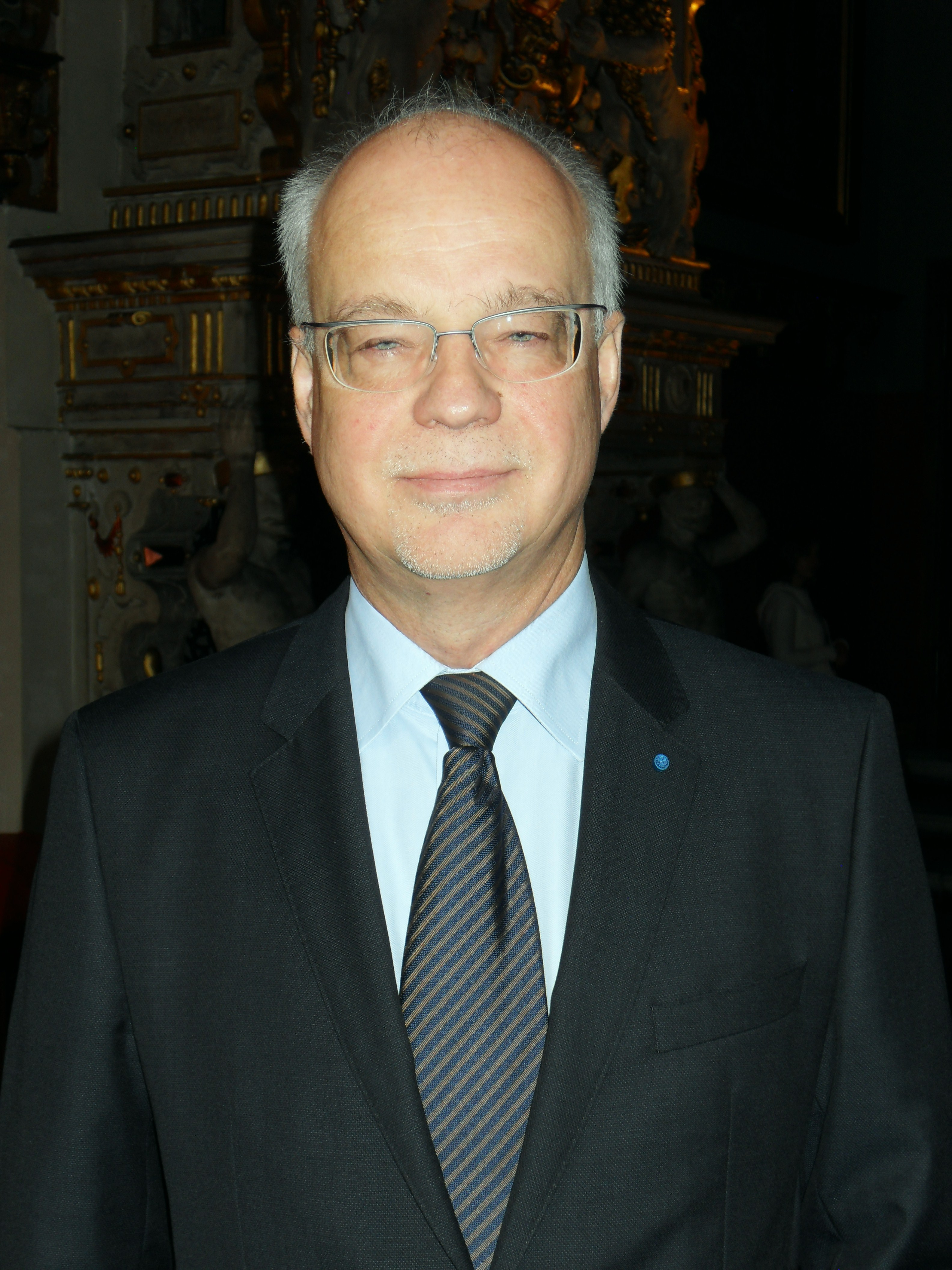 Tomasz Posadzki, prezydent Gdańska w latach 1994-1998.